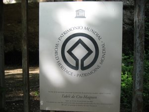 Plaque de l'Unesco signifiant l'inscription de l'abri sur la liste du patrimoine mondial de l'Humanité par l'UNESCO